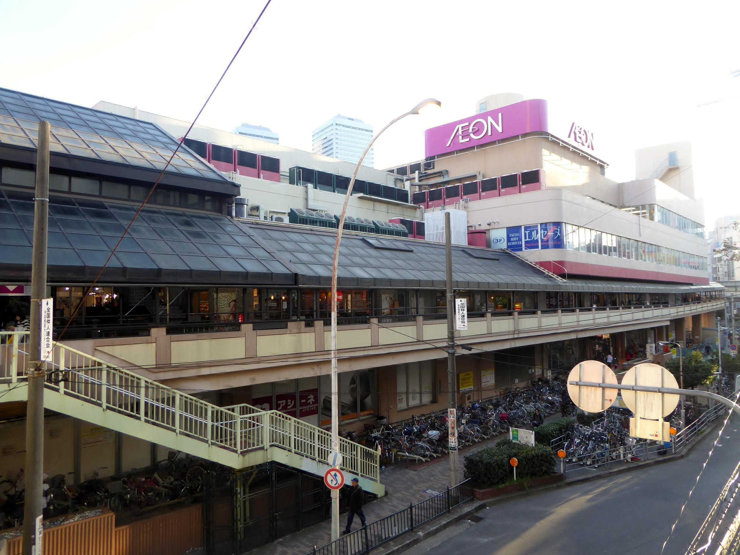 イオン京橋店を撮影。